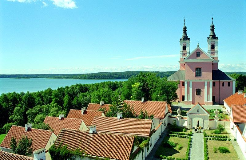 Wigry, Poland